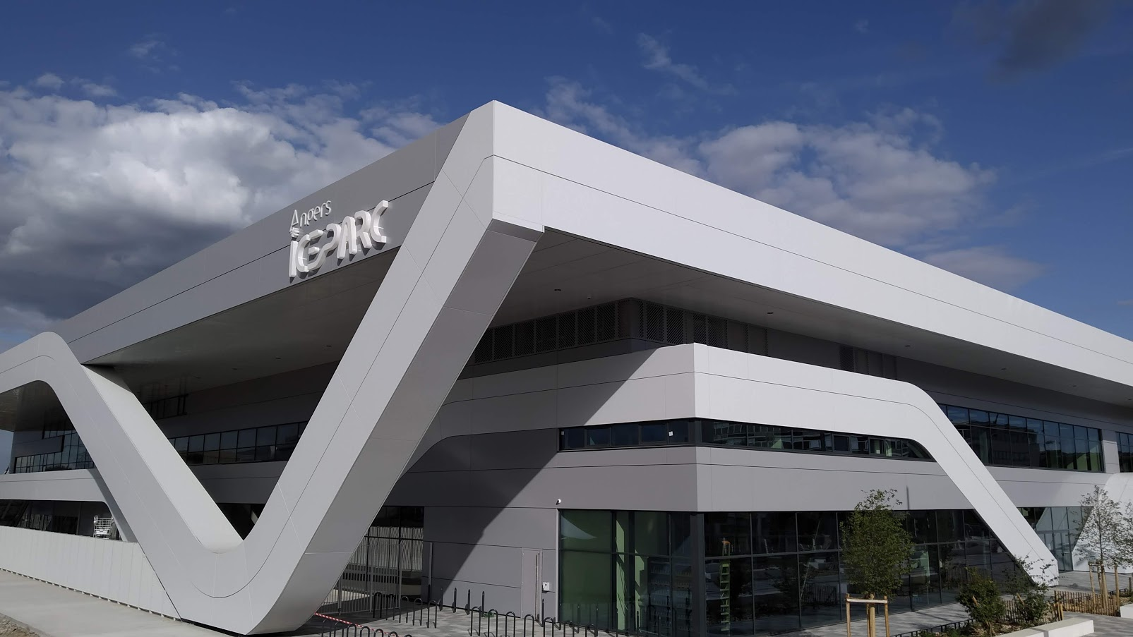 Angers Iceparc vu depuis le pont confluences